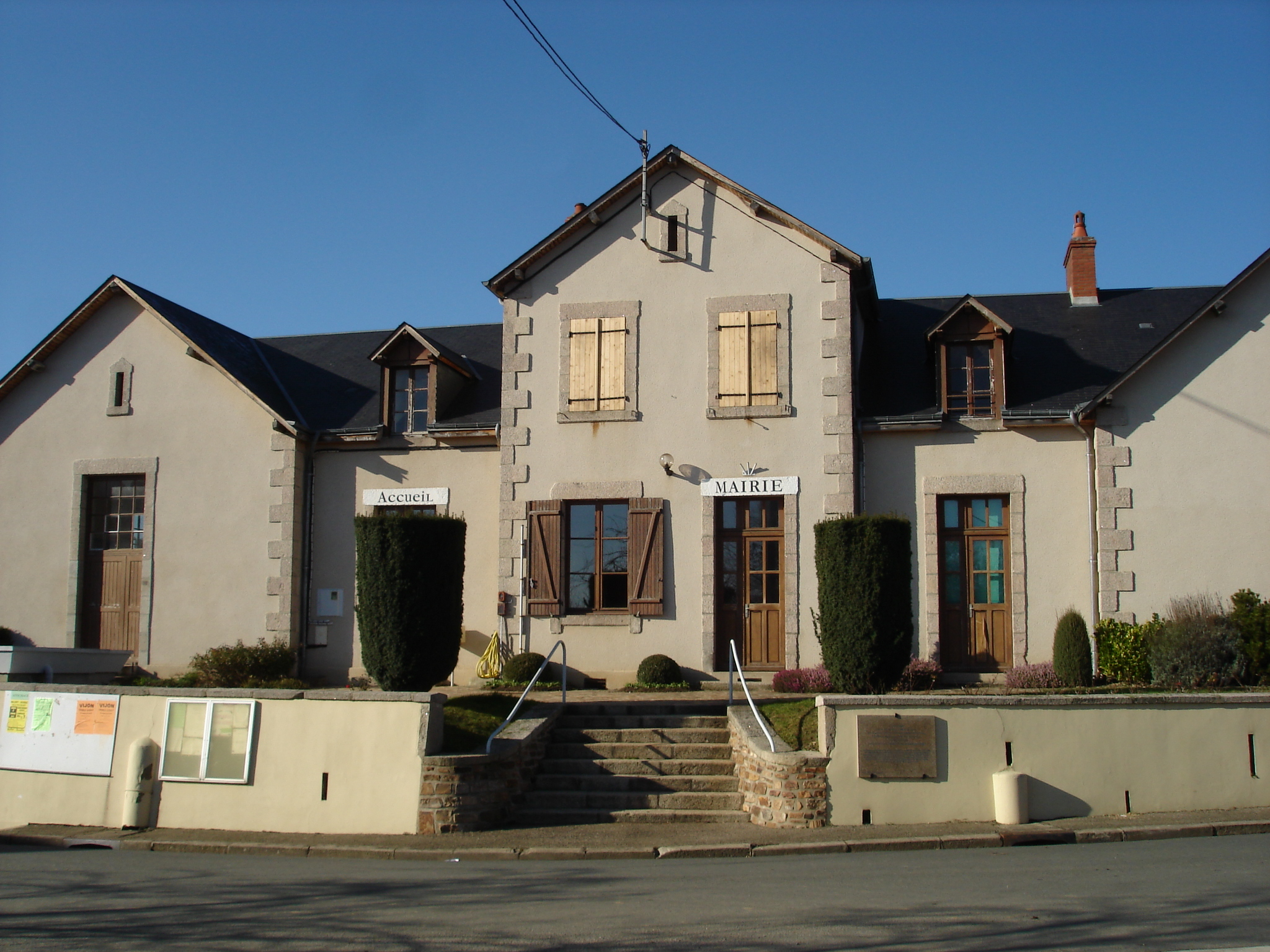 Vijon (36) : La mairie.